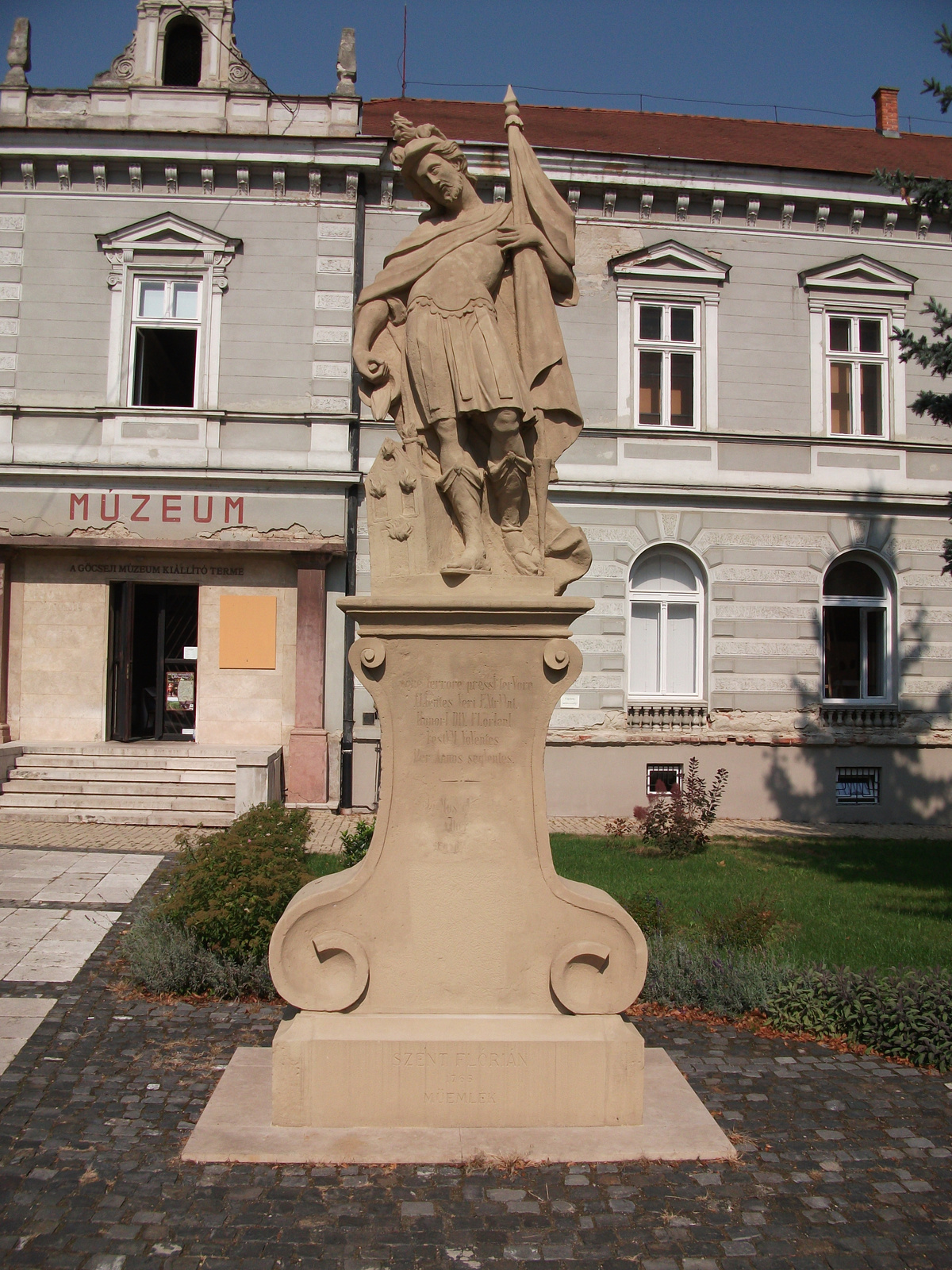 Szent Flórián-szobor (Zalaegerszeg, Szabadság tér) This is a photo of a monument in Hungary. Identifier: 11065